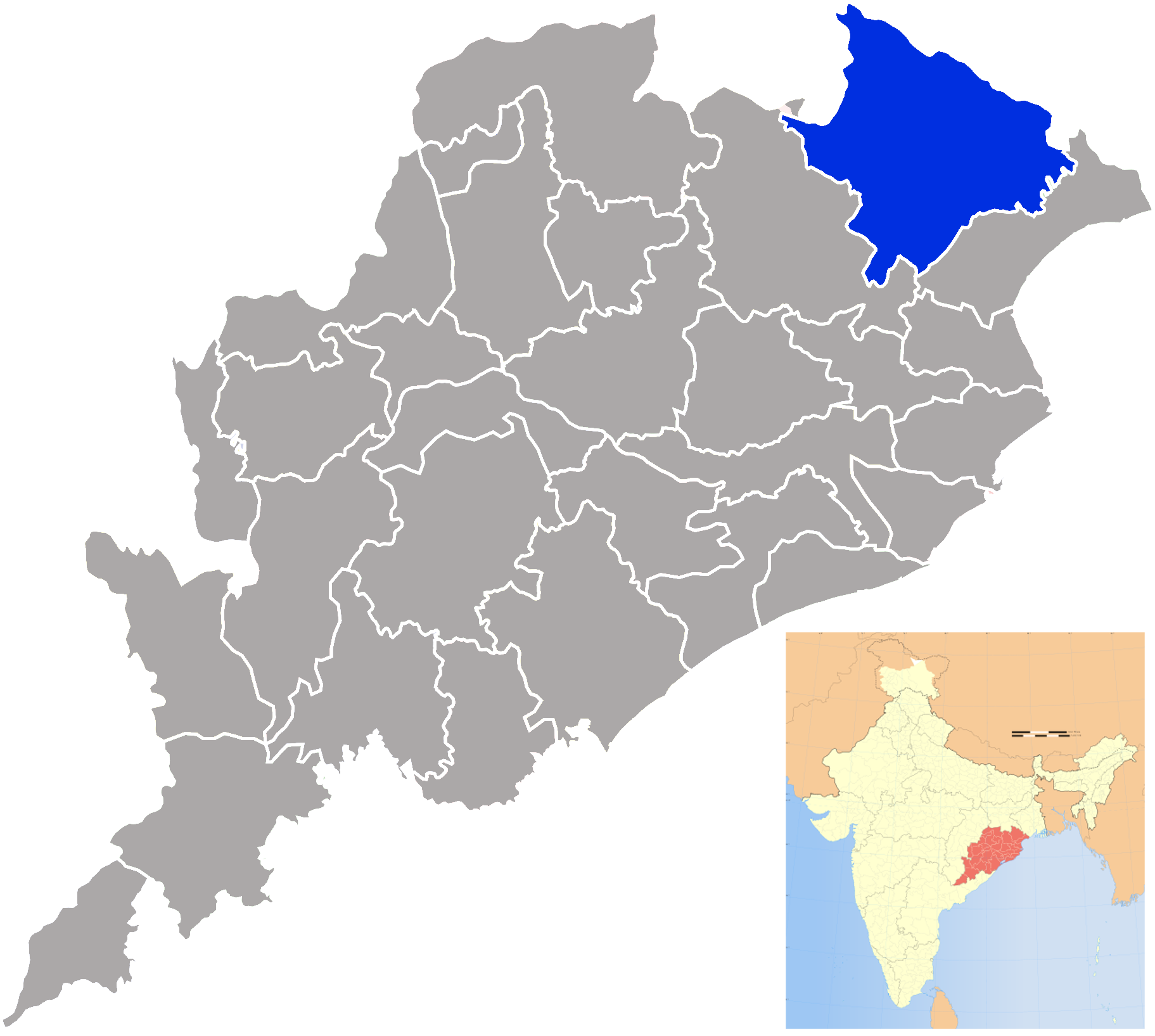 Distrio de Mayurbhanj en Orissa